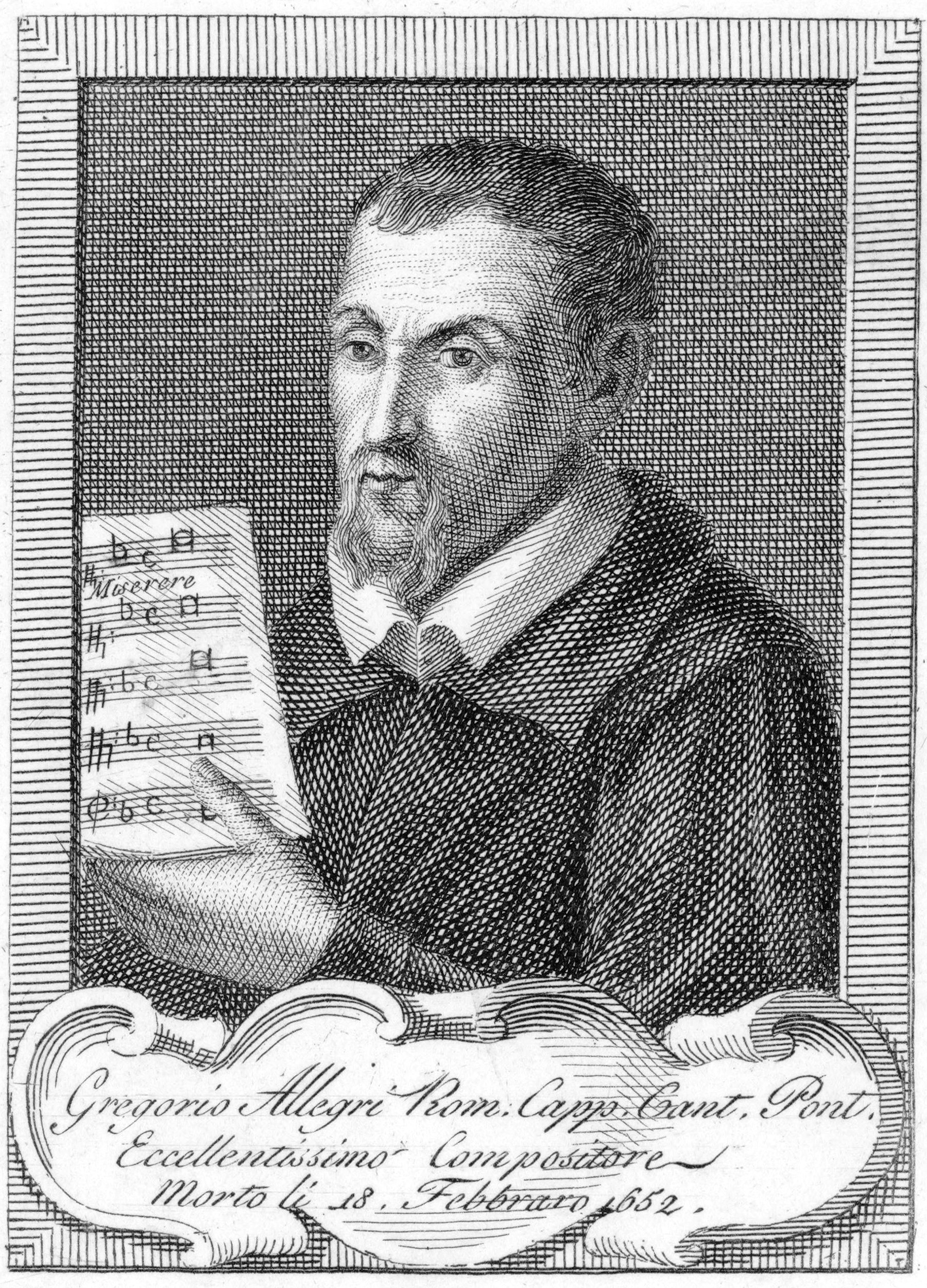 Depicted person: Gregorio Allegri (1582-1652)